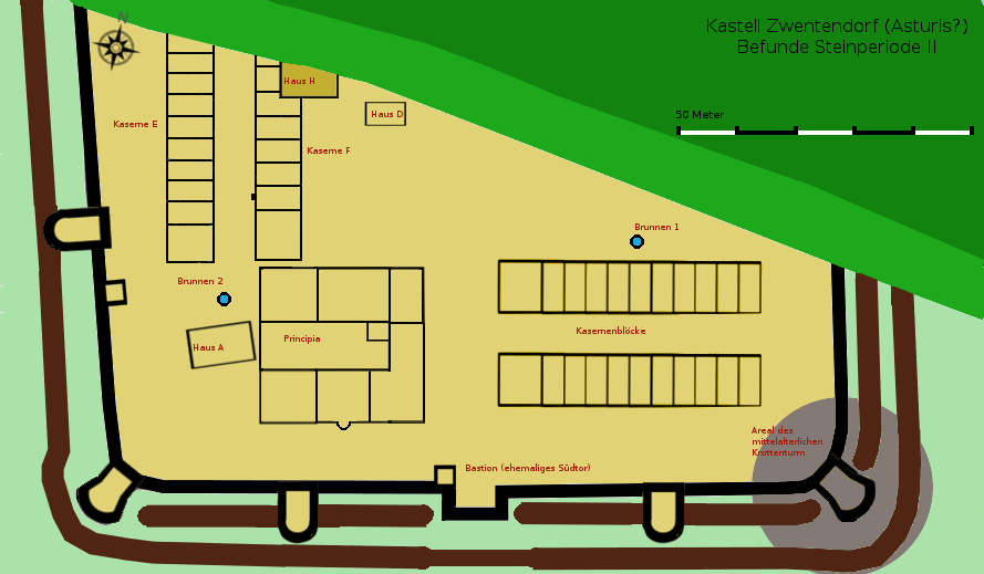 Grundrisse des spätantiken Kastell Zwentendorf (A), Steinperiode II + mittelalterl. Erdwerk Krottenturm.